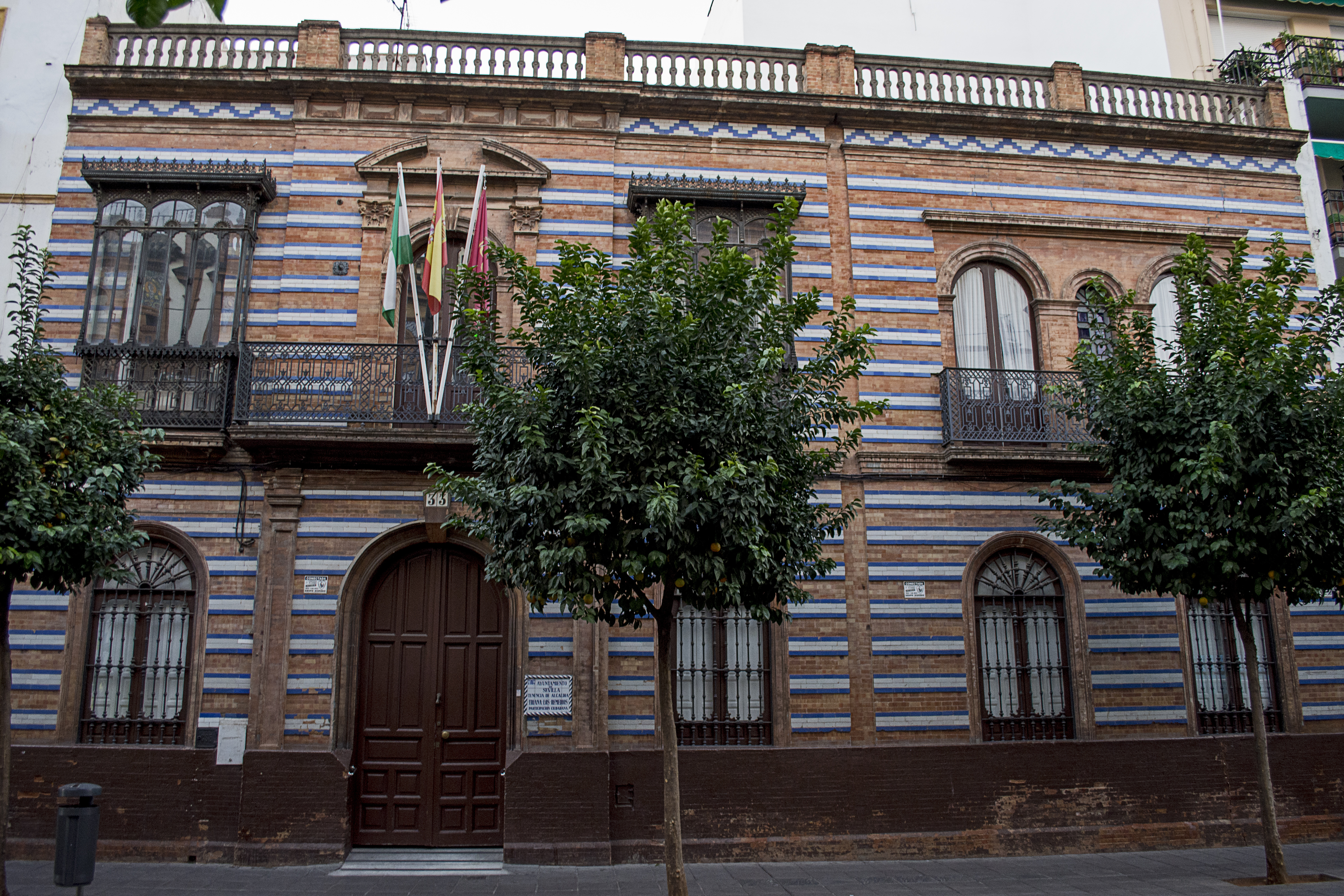 Casa Mensaque en calle San Jacinto de Sevilla. Obra del arquitecto Juan Talavera y de la Vega. (Hacia 1900)